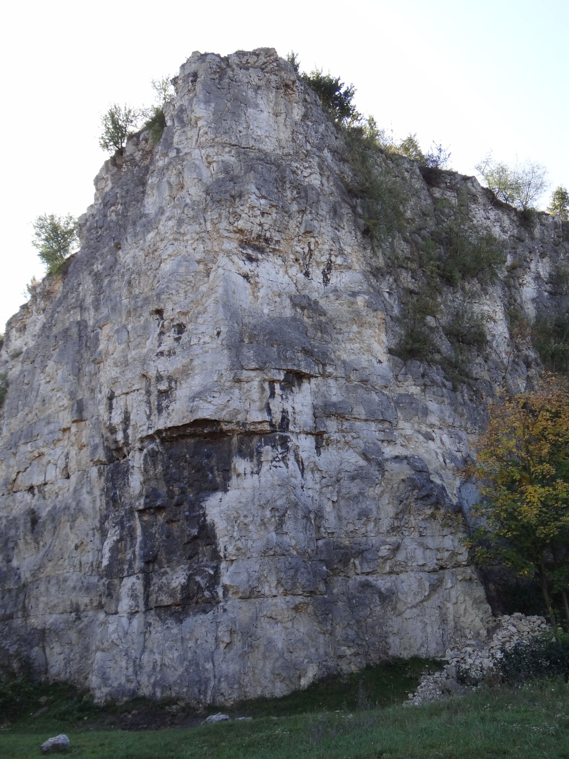 Baba Jaga na Zakrzówku w Krakowie